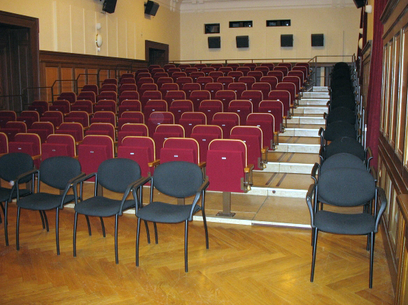 Kino Beseda v Měšťanské besedě v Plzni.